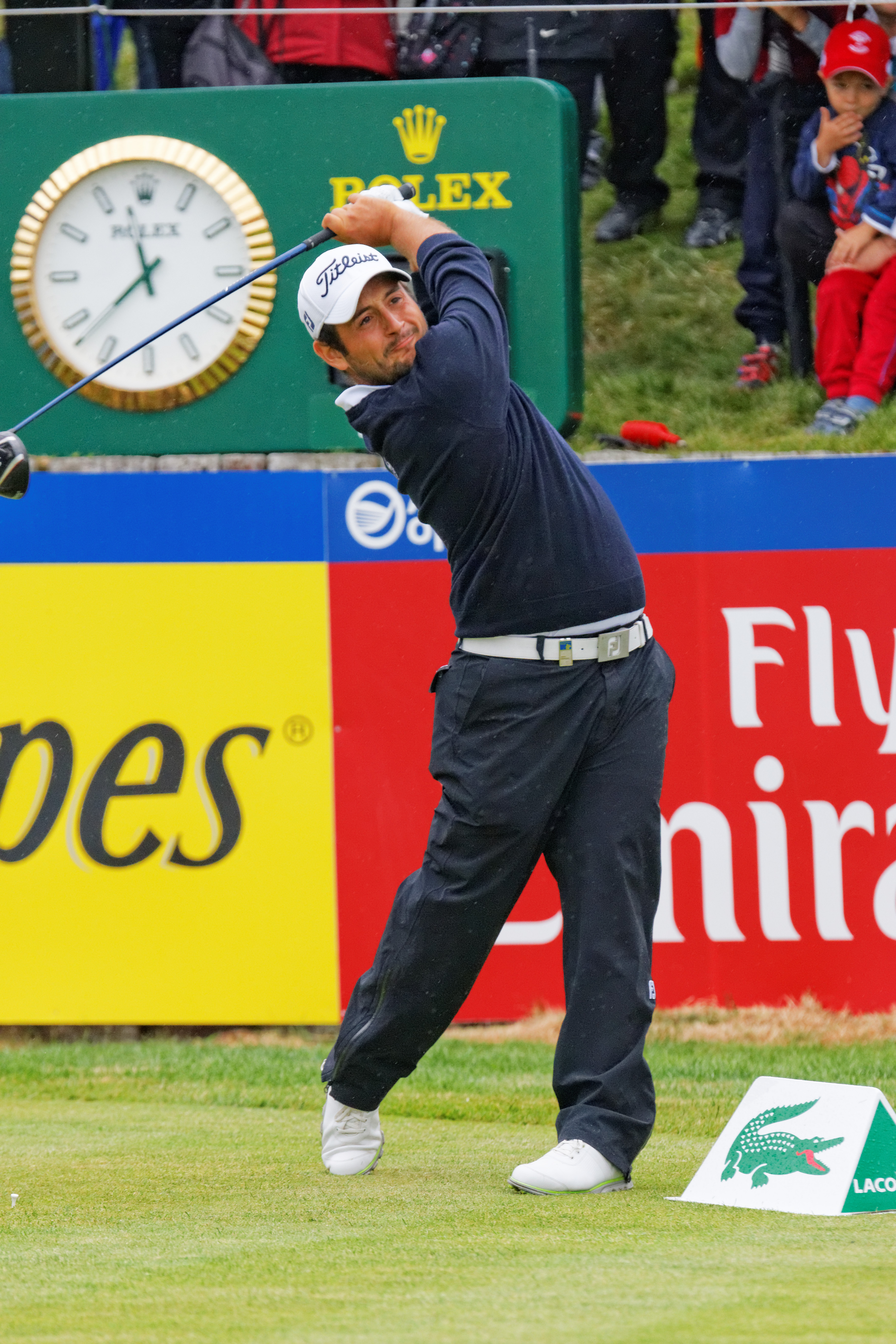 Alexander Levy lors du quatrième tour de l'Open de France 2014 - Golf National - Saint-Quentin-en-Yvelines (78) - départ du trou n° 1